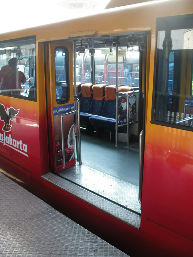 Typische Situation eines an der Haltestelle stehenden Busses mit weitem Spalt zwischen Bahnsteig und Fahrzeug